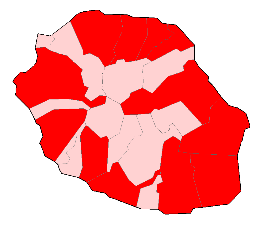 Carte de la Réunion localisant des hagiotoponymes.